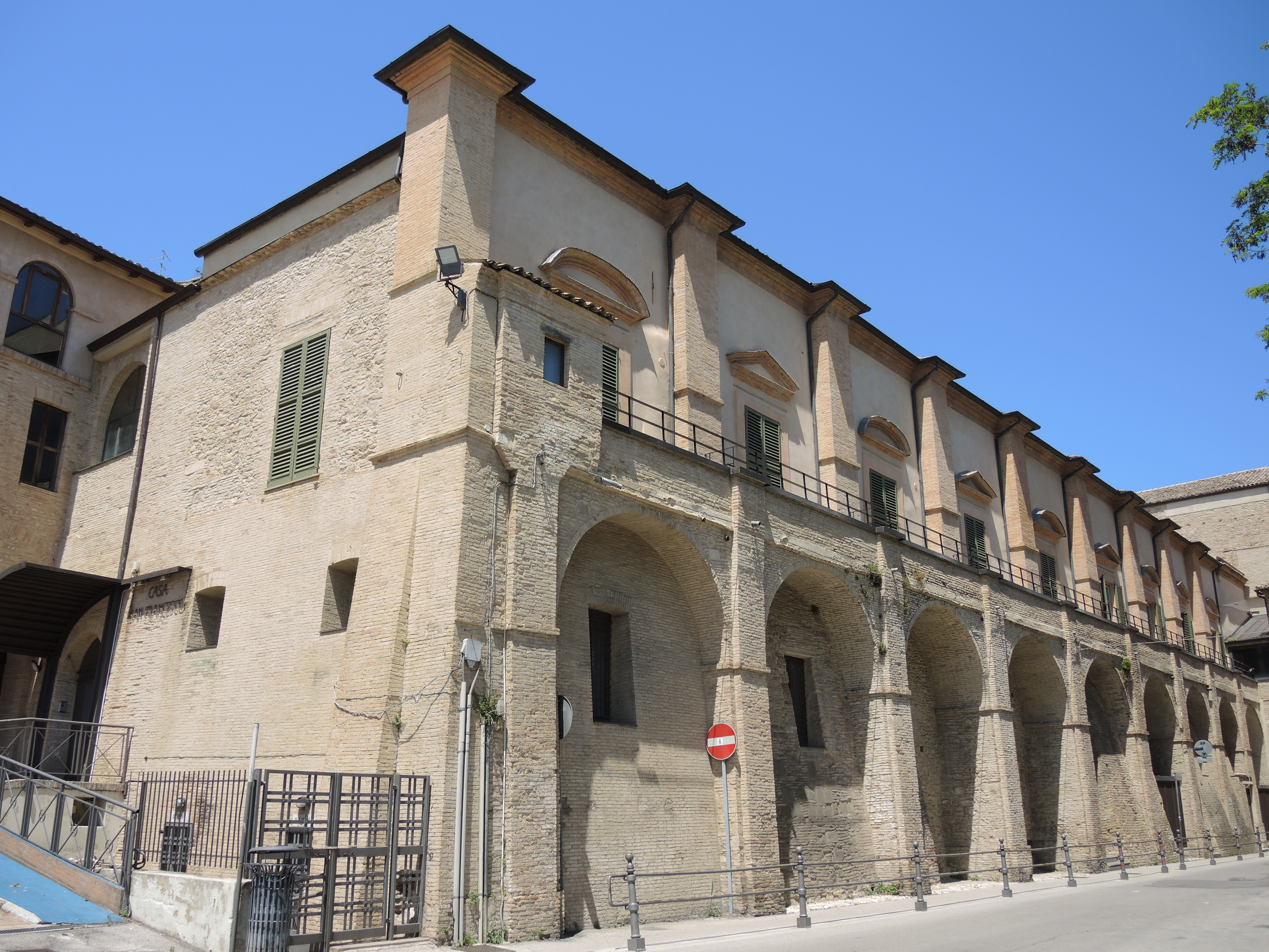 Lanciano - Chiesa di San Francesco